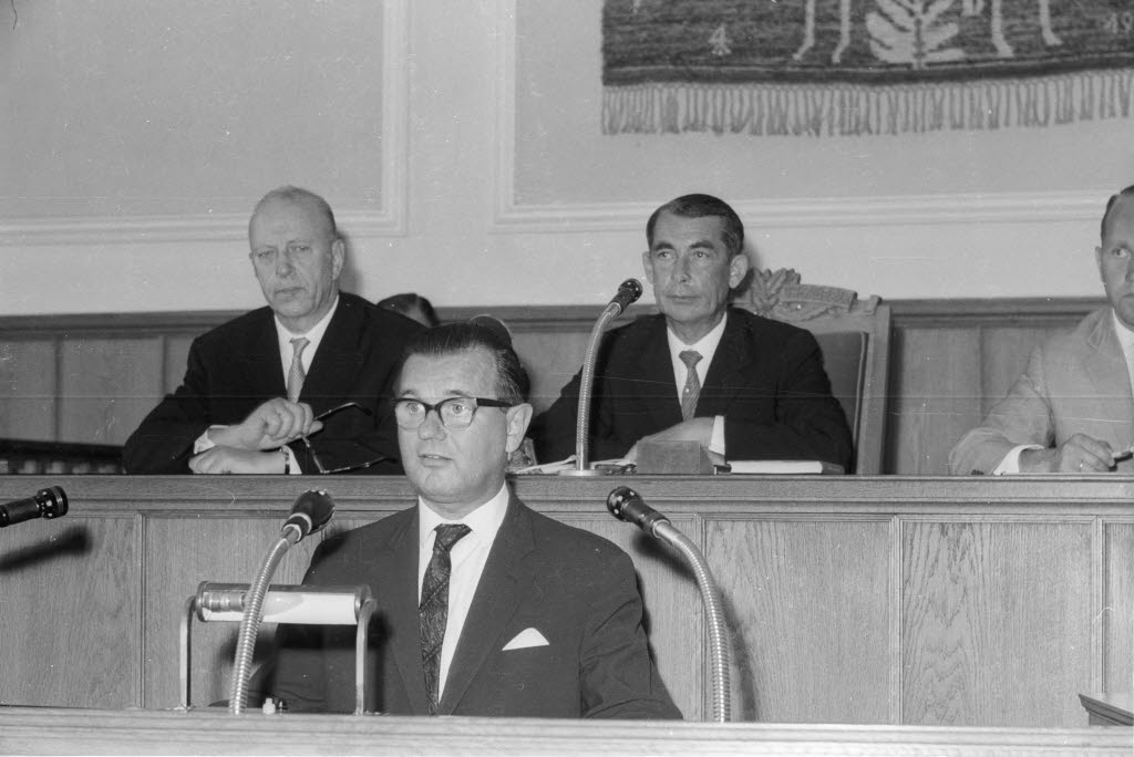 zum Thema Landespressegesetz. Im Bild u. a. Landesinnenminister Hartwig Schlegelberger (2. v. l.) am Rednerpult und Landtagspräsident Claus Joachim von Heydebreck (3. v. l.).